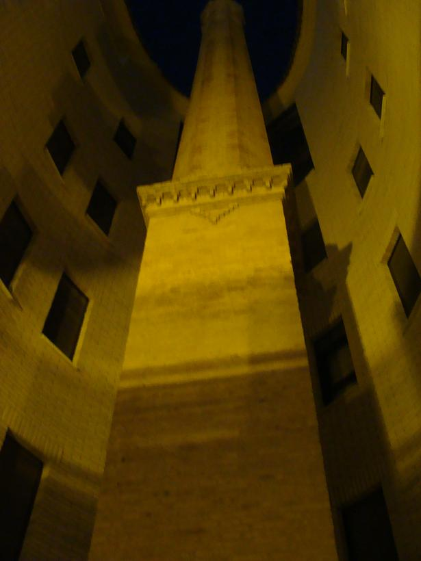 Antigua chimenea de fábrica en Utiel, Valencia.